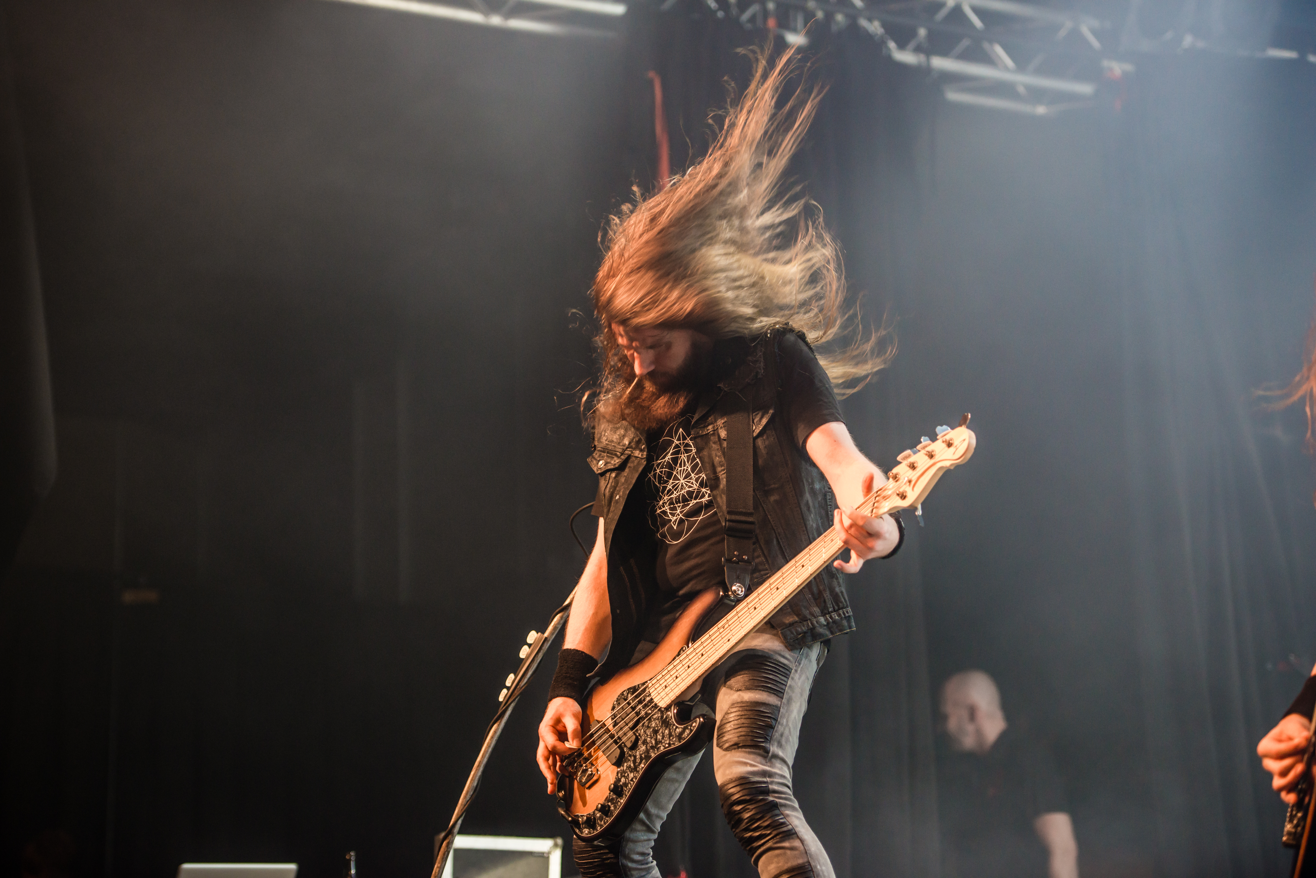 'Epica - Epic Metal Fest - Eindhoven'